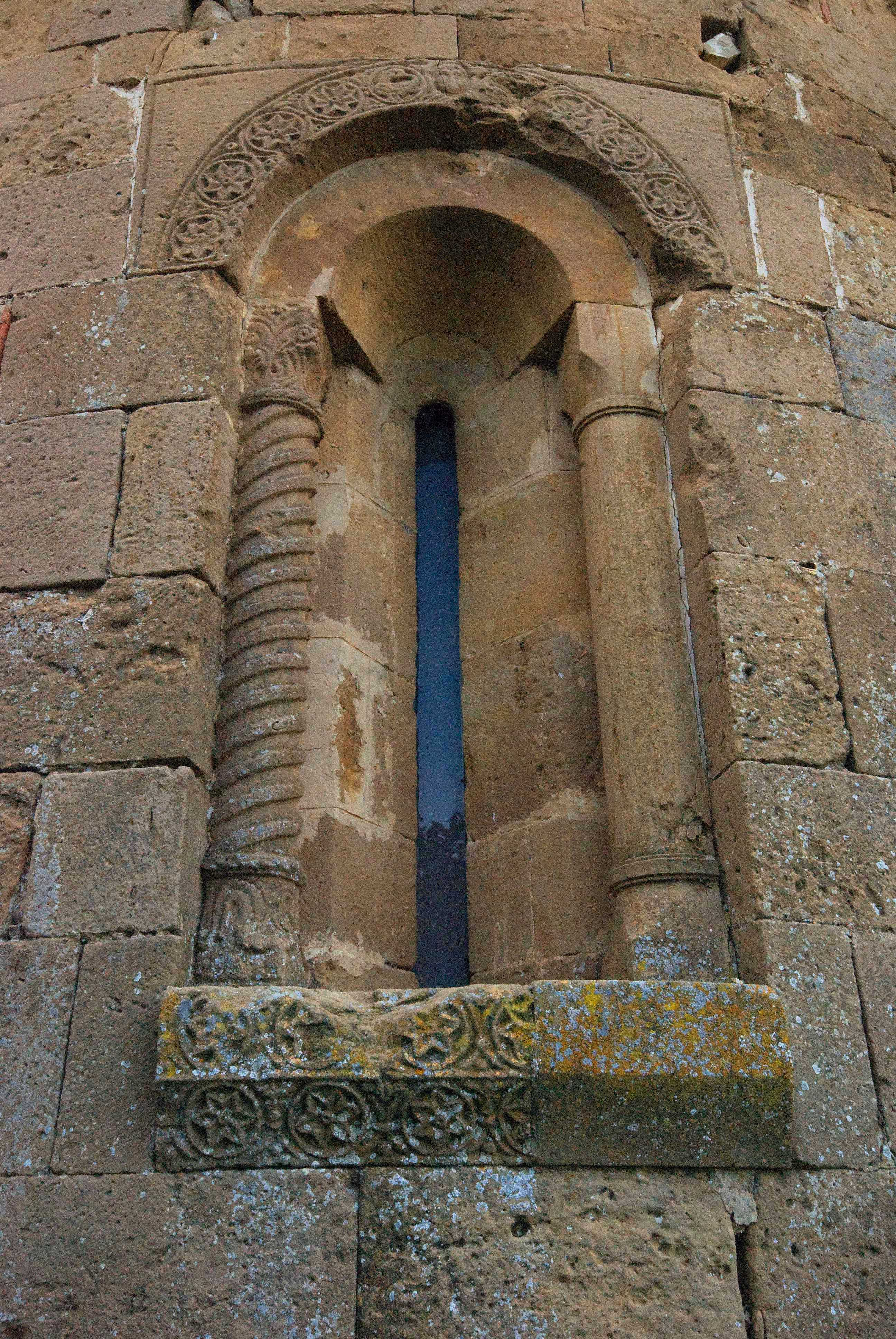 finestra della abside della chiesa di san Pietro a cedda (Poggibonsi)